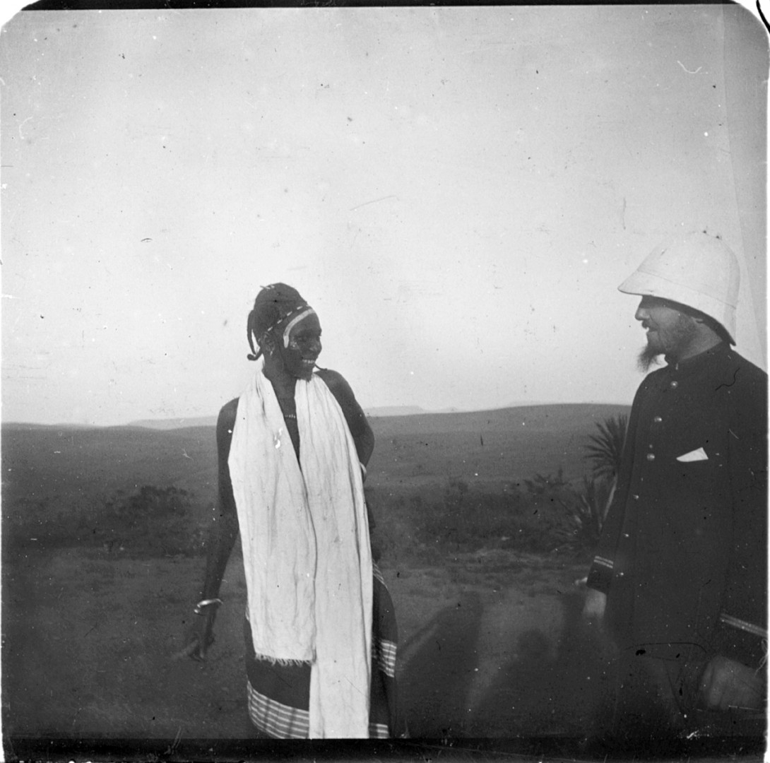 Colon français et Africaine, Beyla (Guinée) Photographie d'Henri Gaden